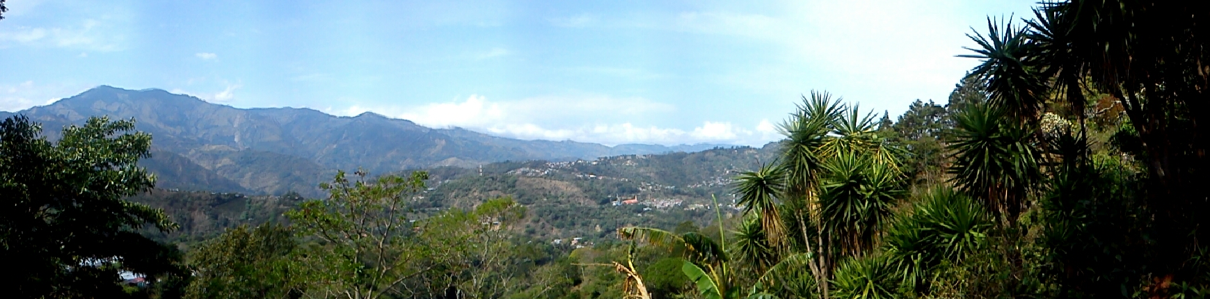 Fotografía panorámica del cantón de Acosta. Destacan, a la izquierda, el cerro Caraigres, y hacia el centro de la foto, el templo católico de San Ignacio de Loyola (anaranjado). Vista desde el cerro Tablazo, Acosta, Costa Rica.